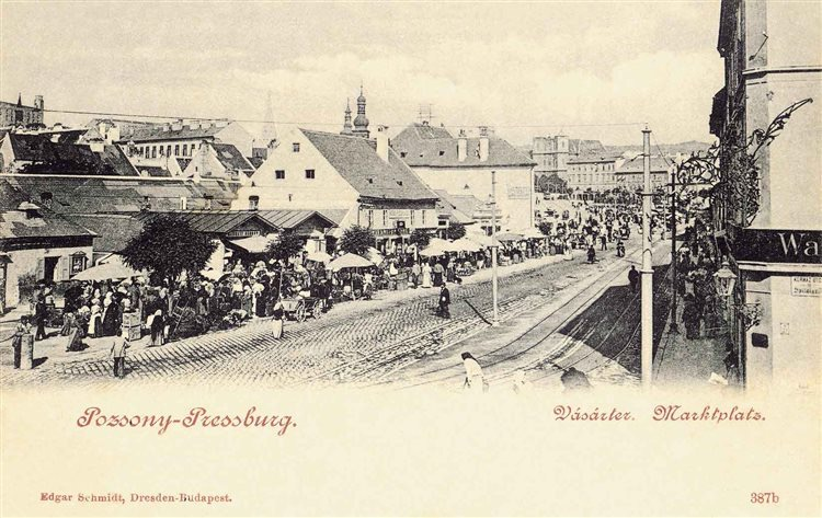 Der Marktplatz zu Beginn des 20. Jahrhunderts